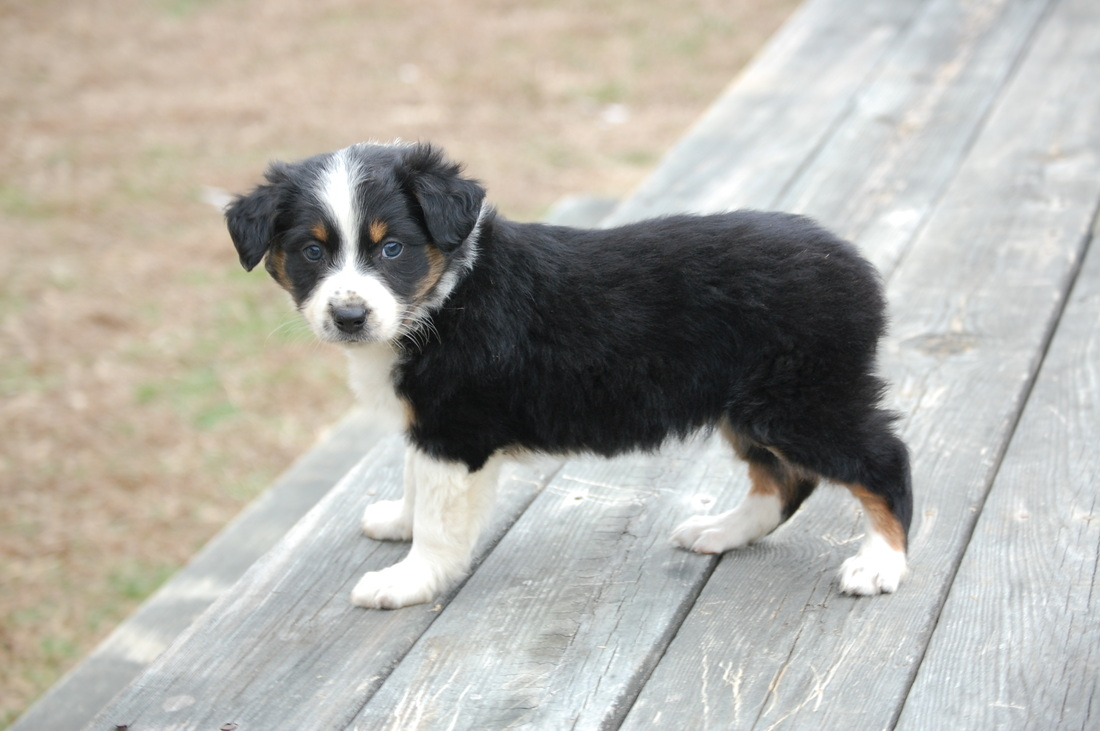 Australian Shepherd" "Australian Shepherds" Aussie "Morgan van Pelt" "Mitch Van Pelt